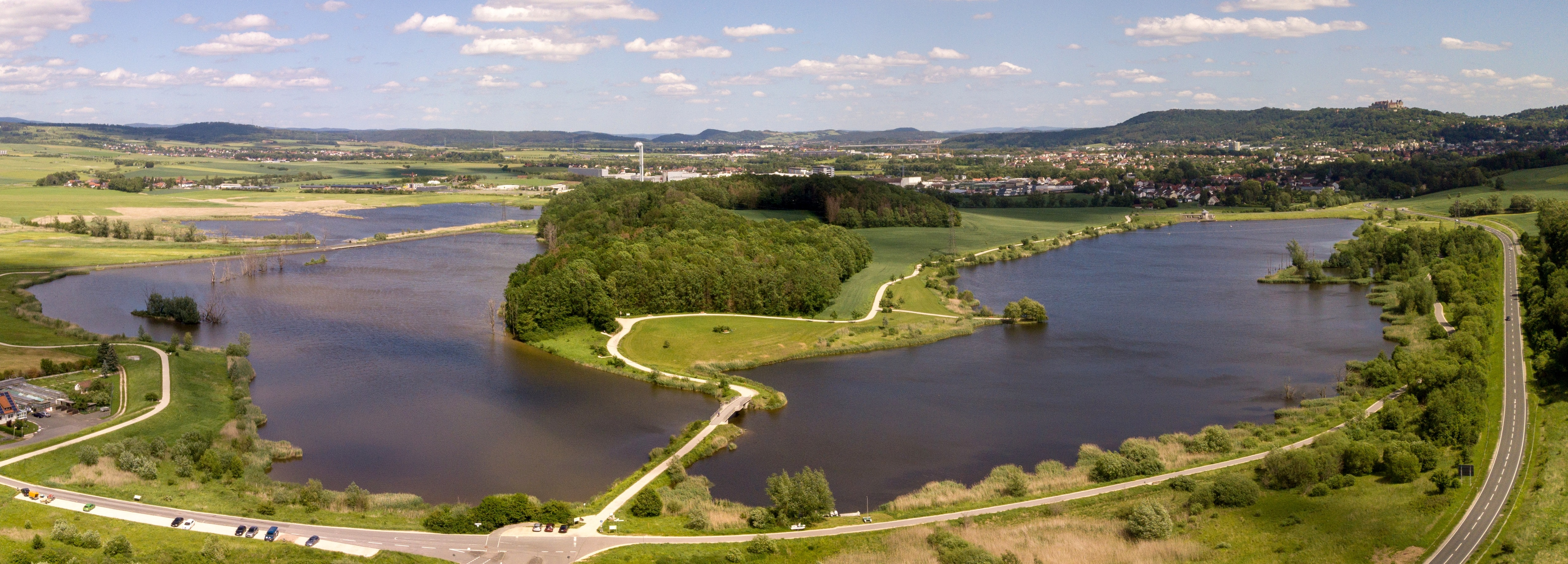 Der Goldbergsee in Coburg im Frühjahr 2019